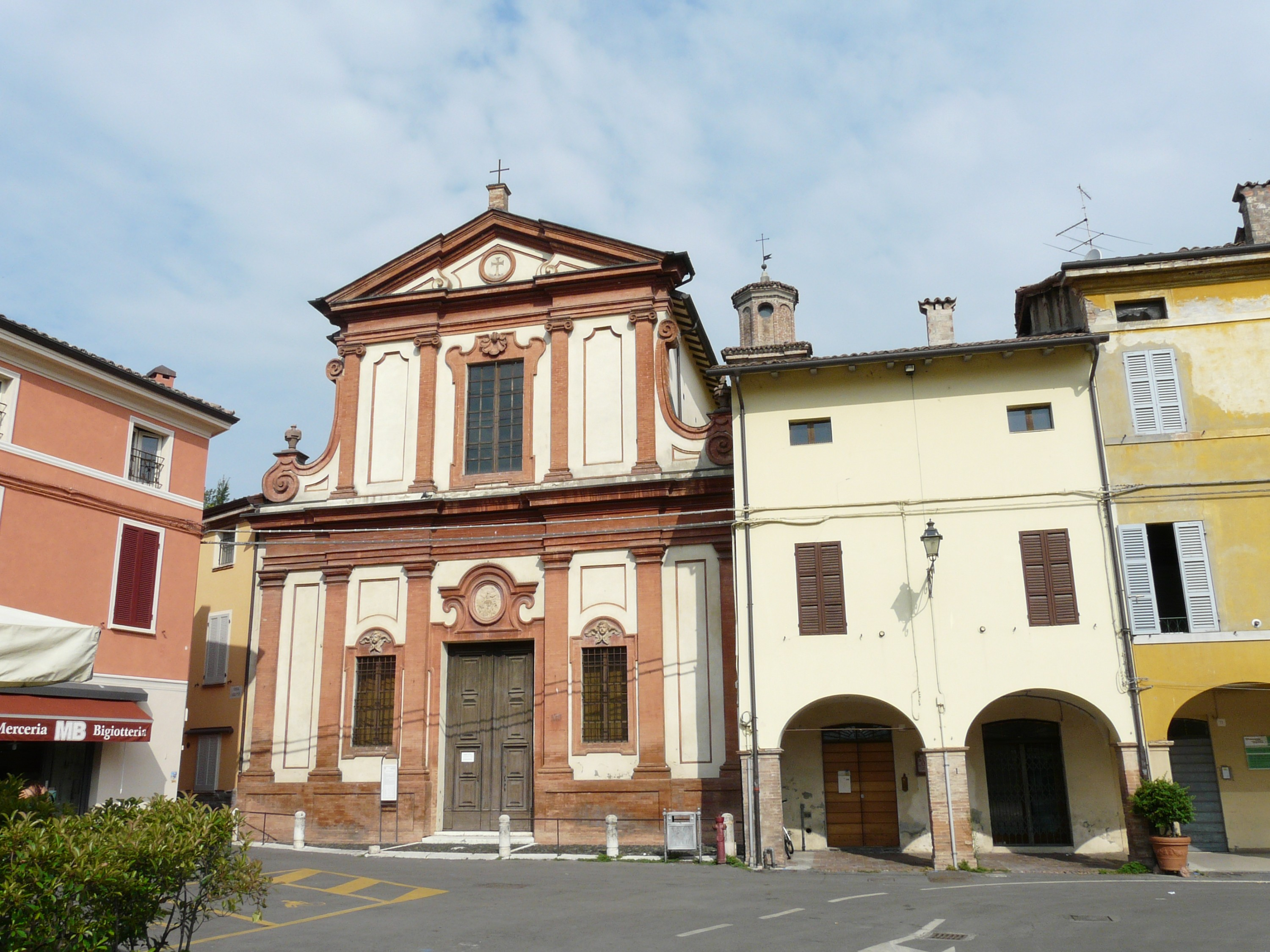 Immagini dell'oratorio dell'Assunta di Fontanellato, Emilia-Romagna, Italia